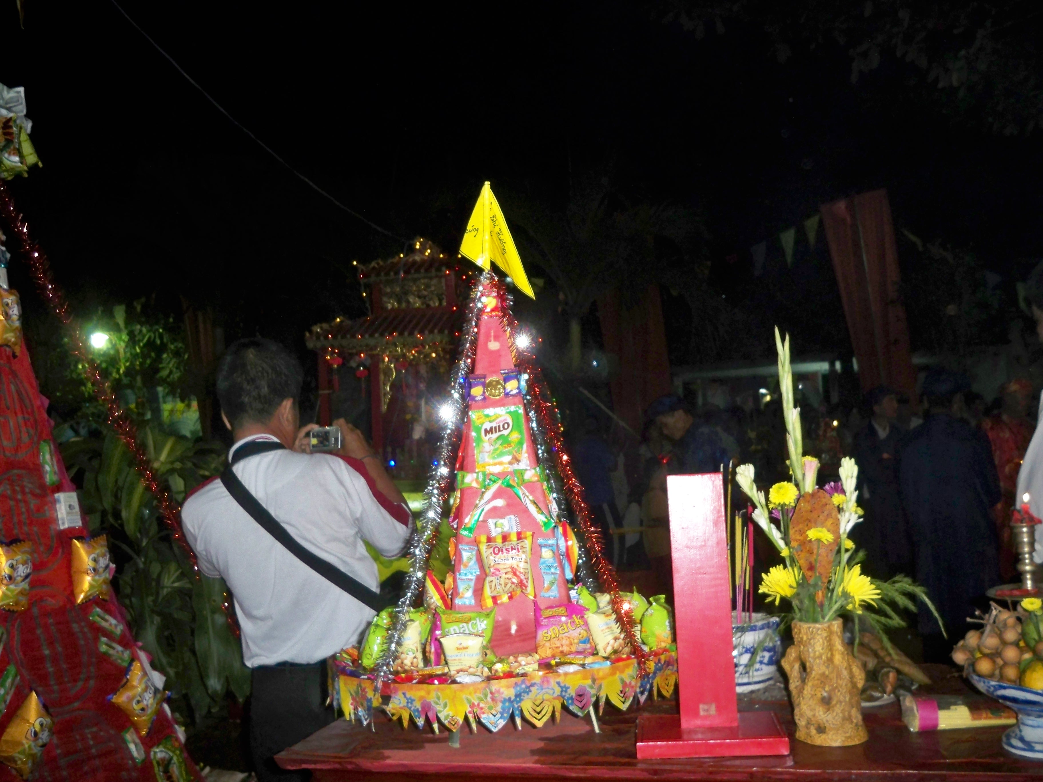 Mâm quả lễ hội làm chay.